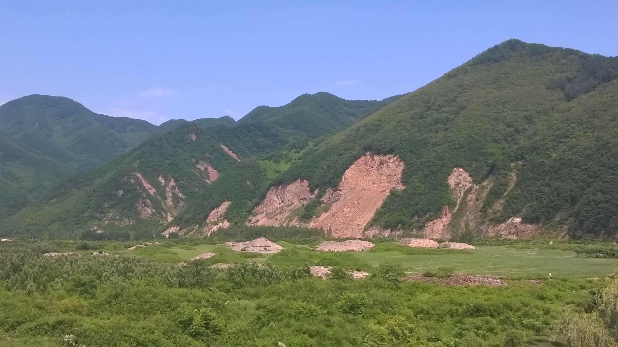 丸都山城山脚下的高丽贵族陵墓